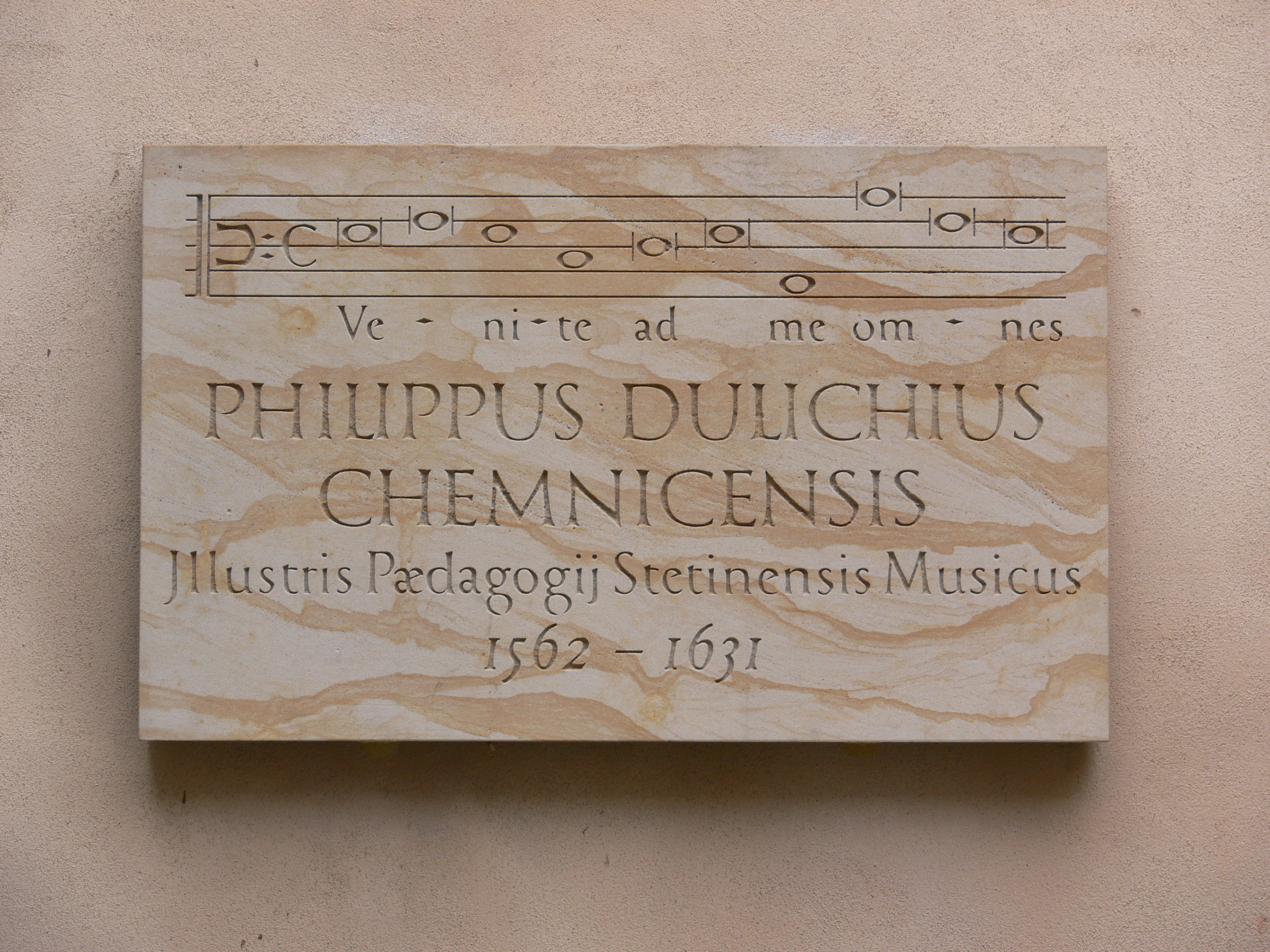 Stadtkirche St. Jakobi, Chemnitz Gedenktafel für Philippus Dulichius